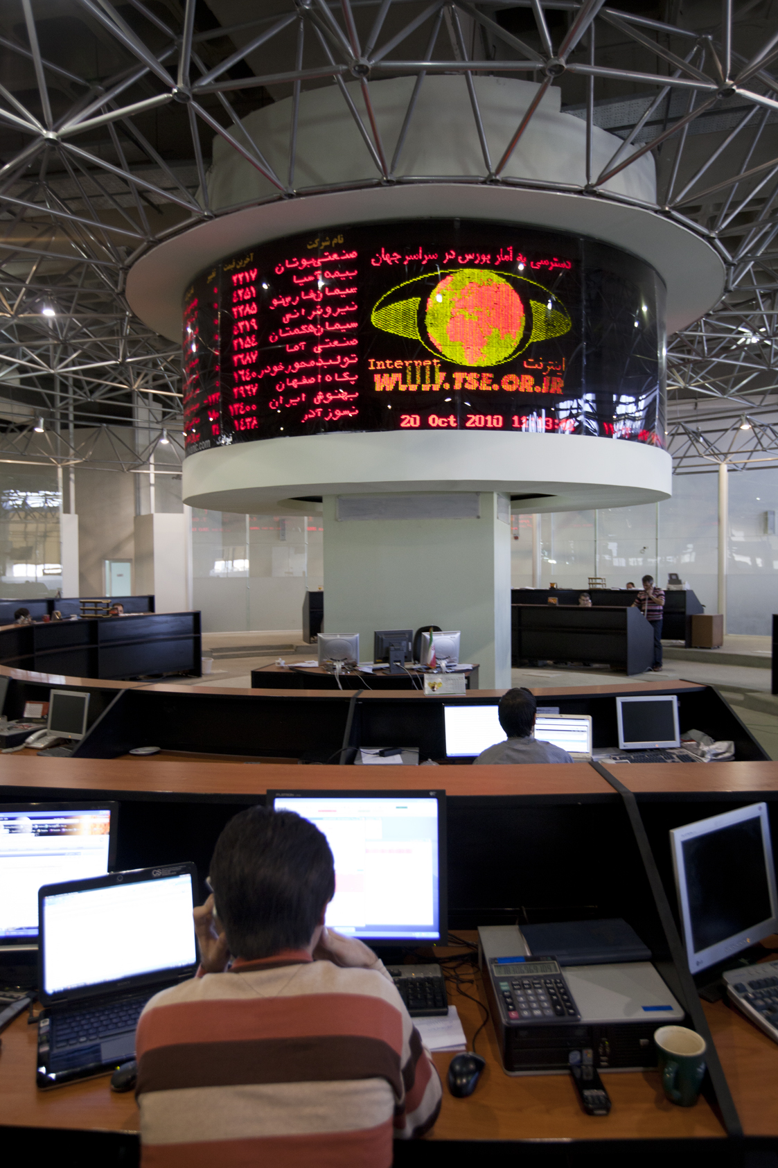 تالار بورس اوراق بهادار تبریز